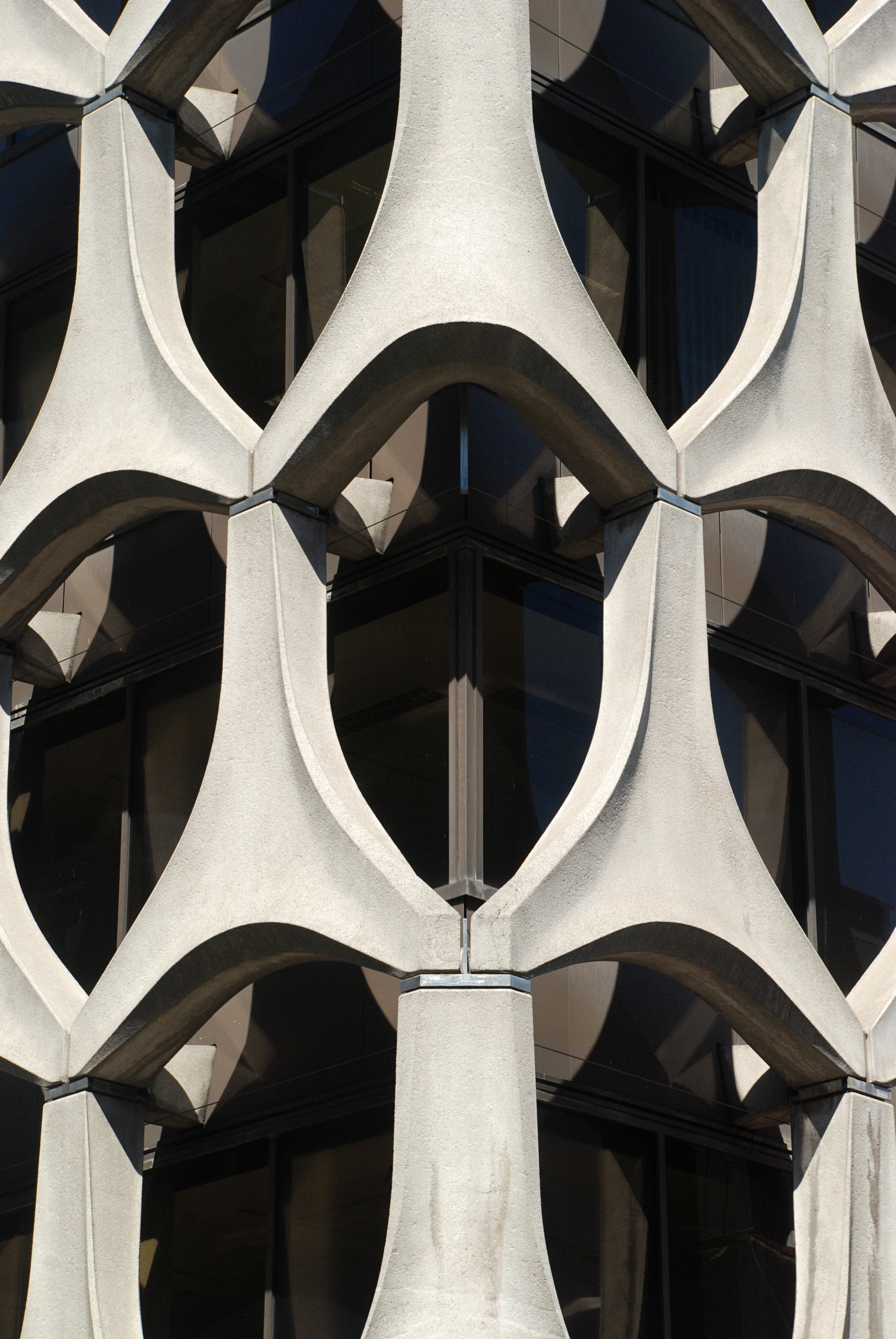 Belgique - Bruxelles - CGER - Bâtiment Marais (architecture fonctionnalise - architectes Marcel Lambrichs, C. Grochowski et D. de Laveleye - 1969-1973)